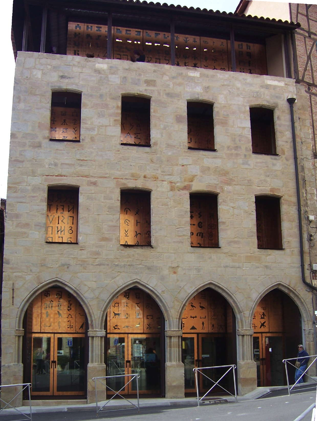 Façade du Musée Champollion à Figeac